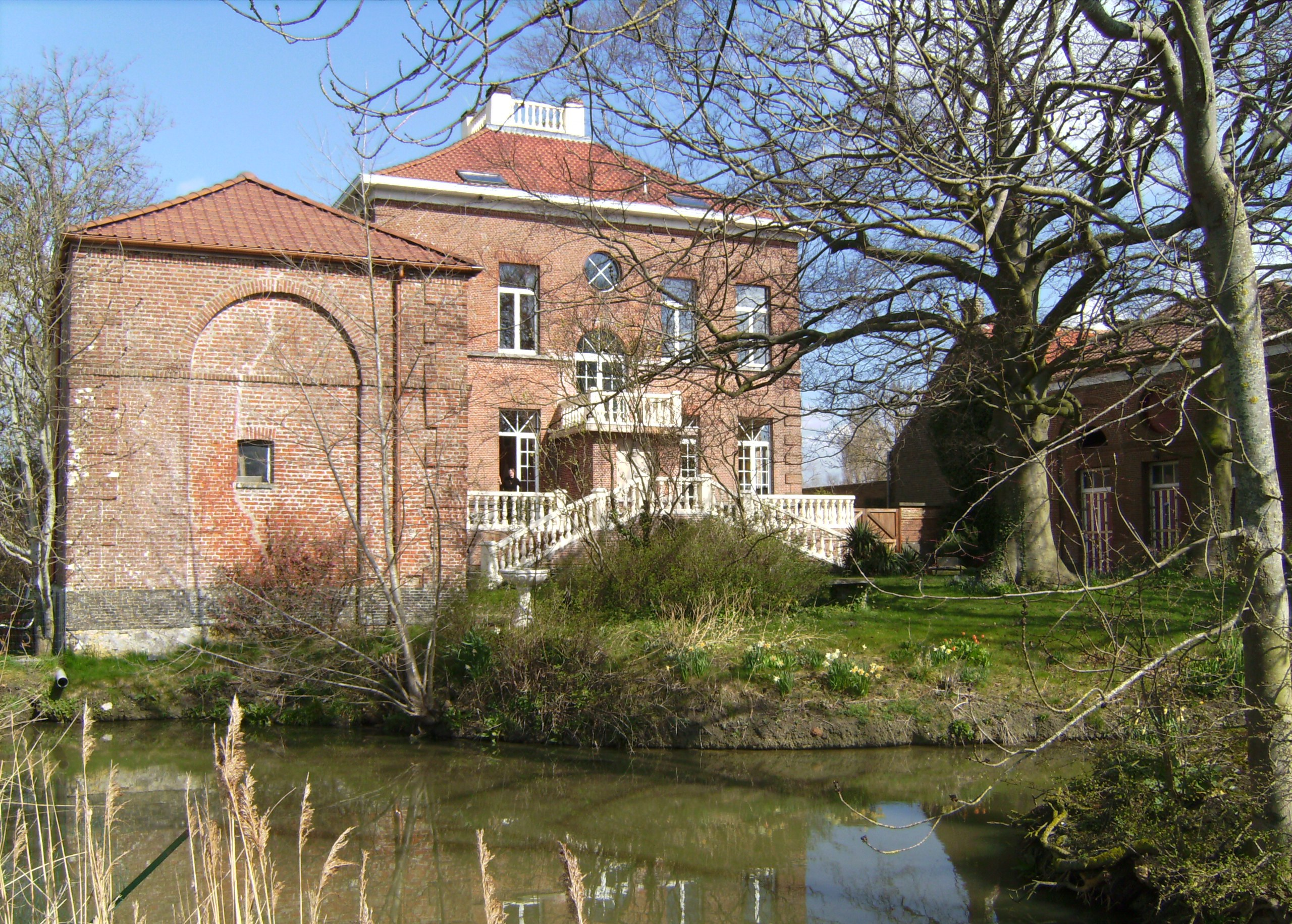 De parktuin is een ware oase.